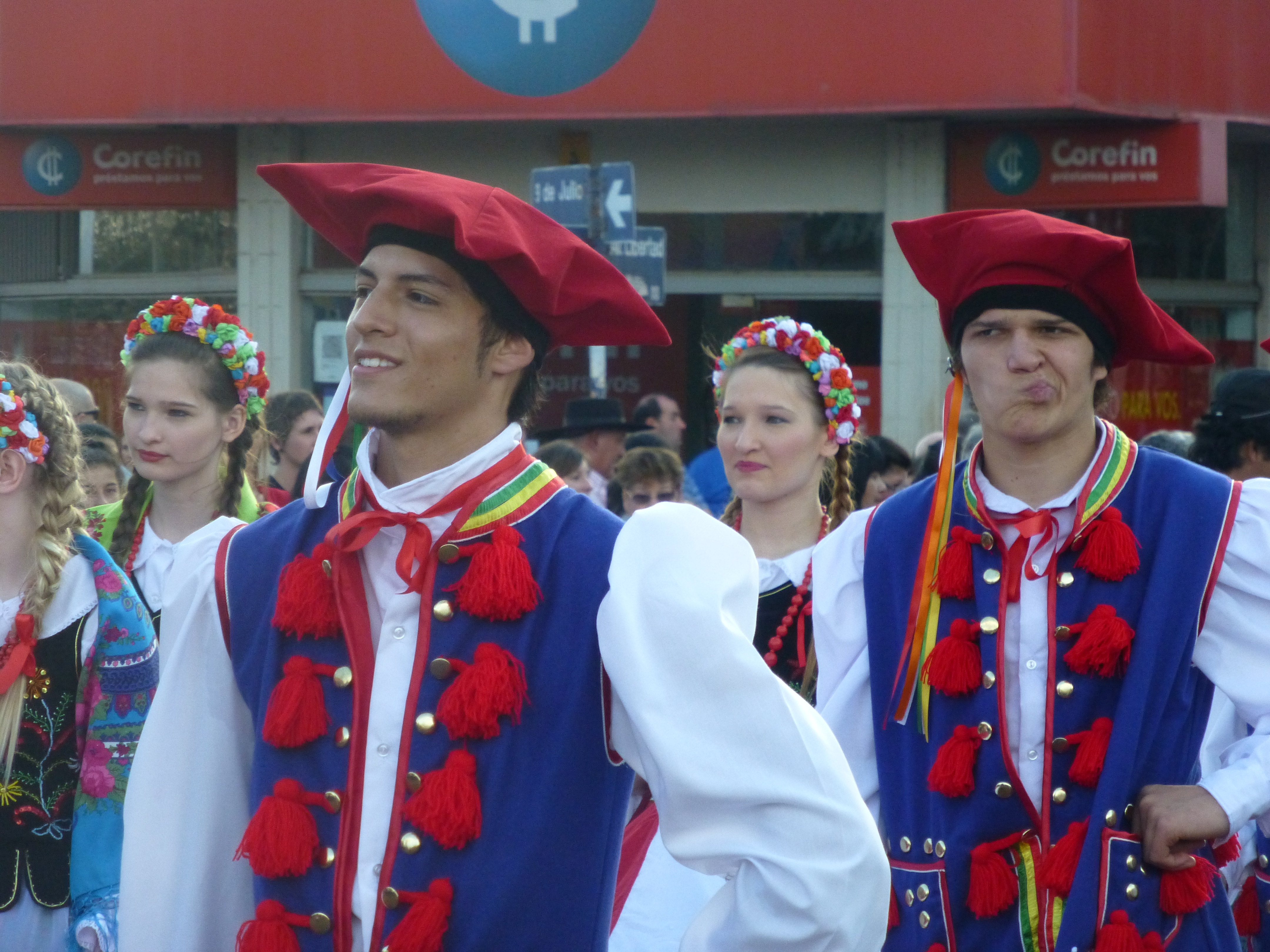 Colectividad polaca durante el desfile de inauguración de la XXXIV Fiesta Nacional del Inmigrante.